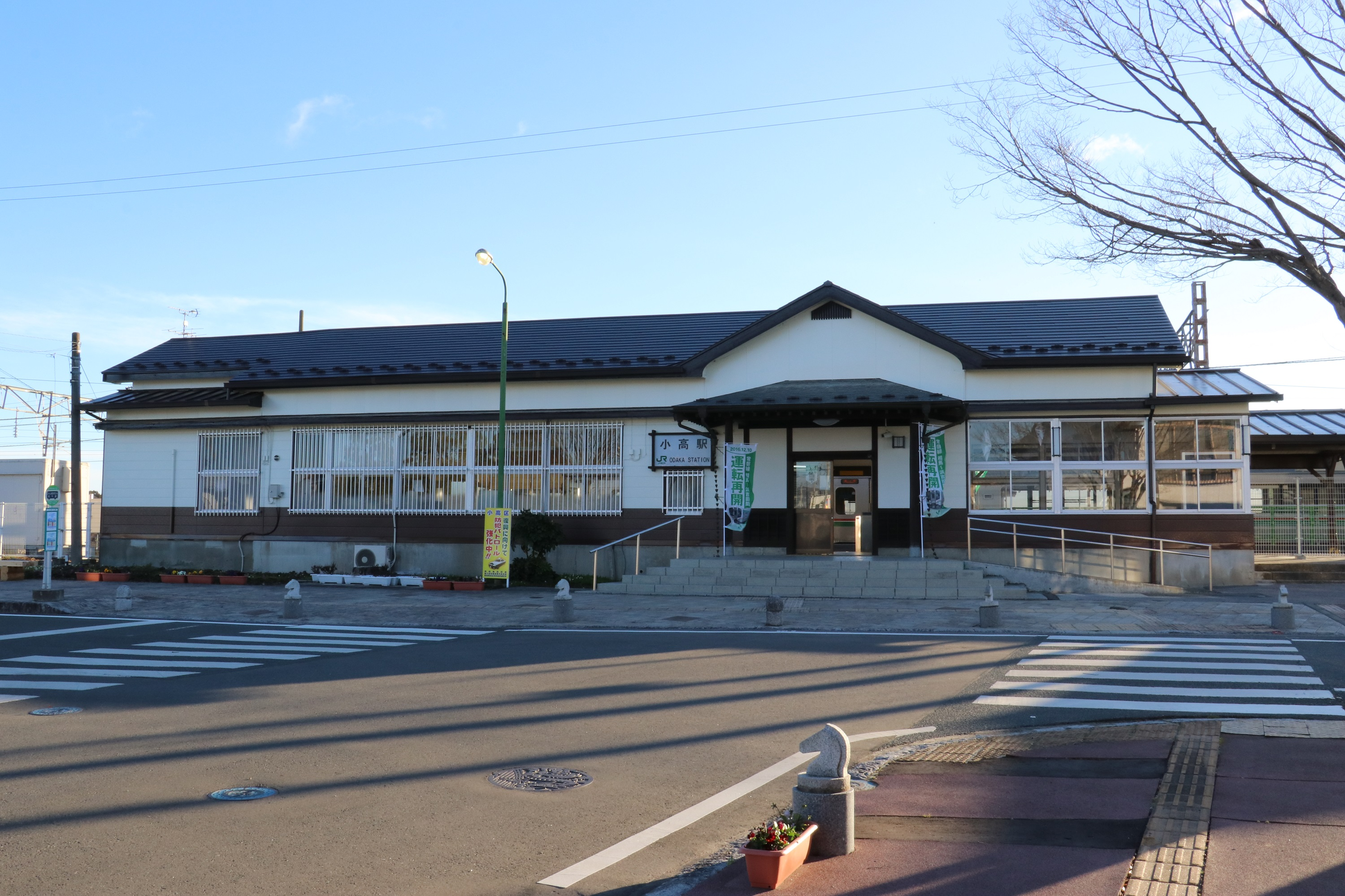 常磐線小高駅